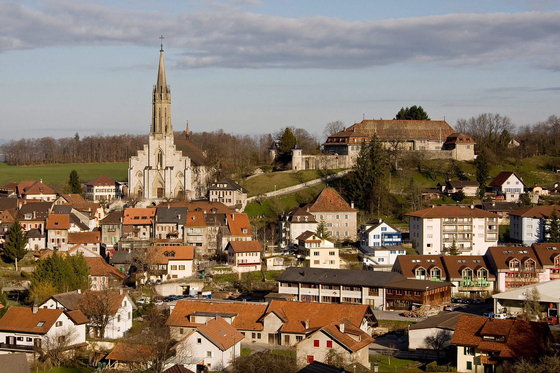 Châtel-Saint-Denis (Kirche und Schloss) im Morgenlicht